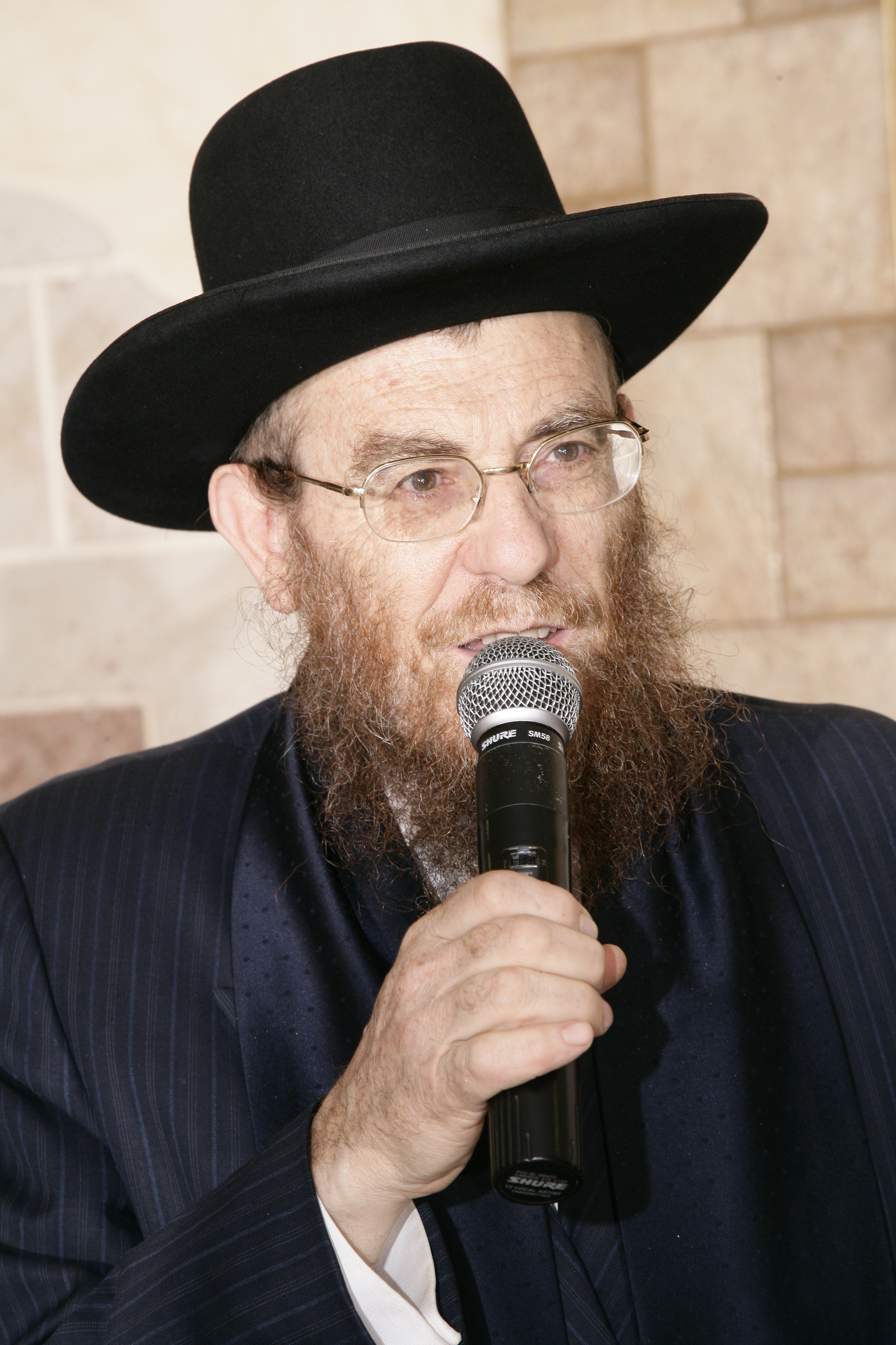 הרב יצחק ברדא, נואם בהילולת הרב נתן בוקובזה ז"ל בנתיבות